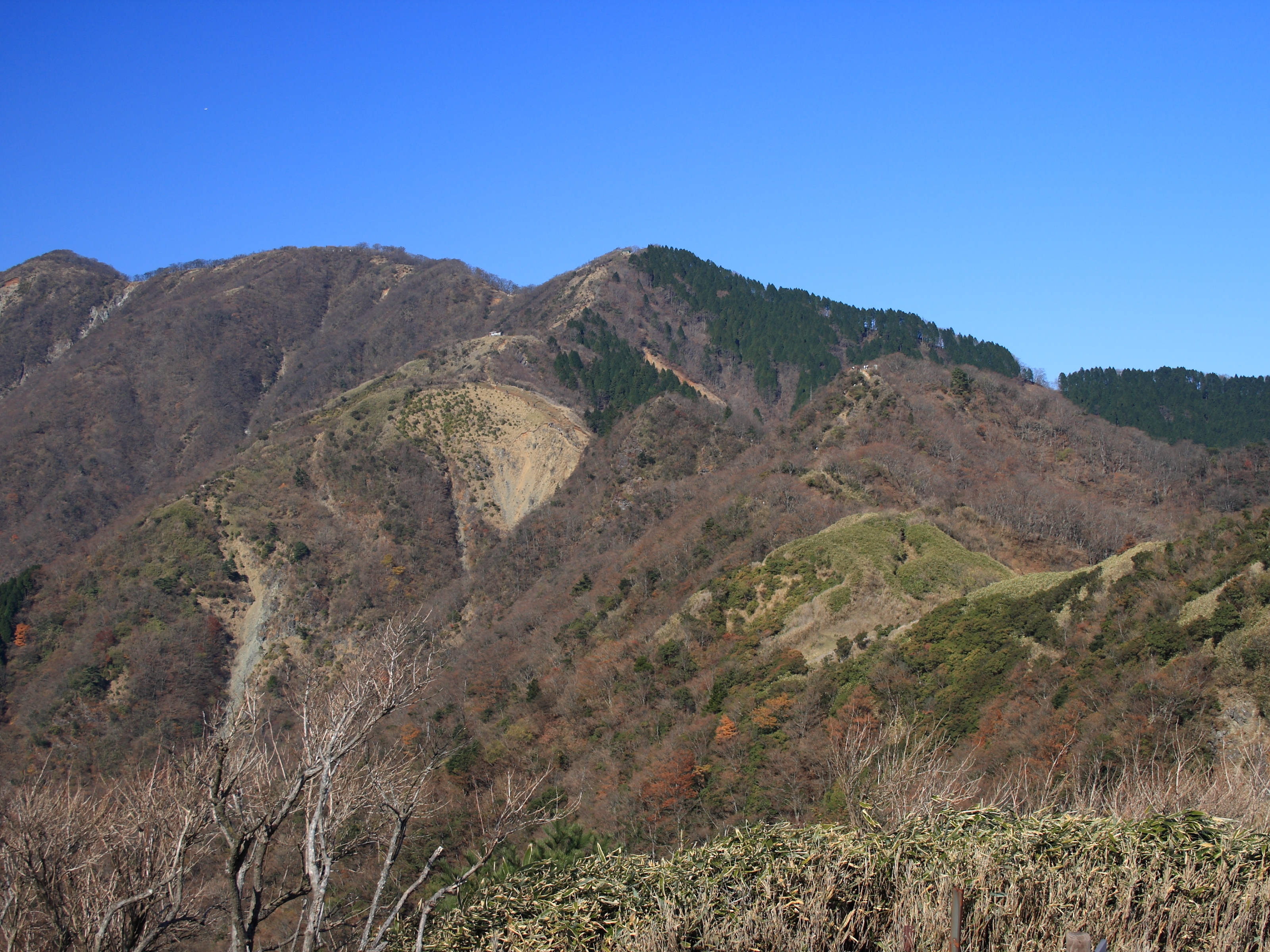 烏尾山より望む新大日